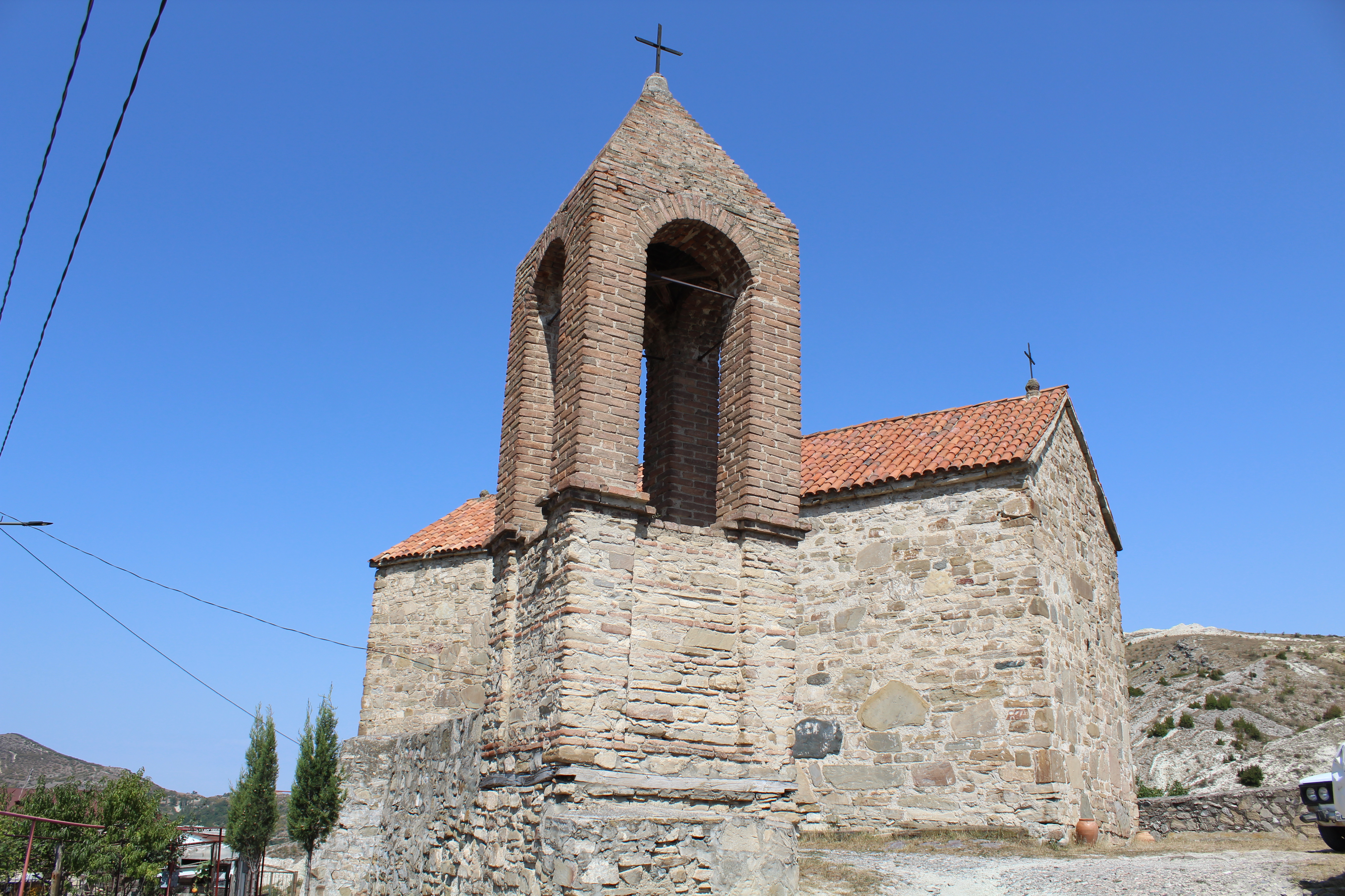 წინარეხის ღვთისმშობლის ეკლესიის კომპლექსი — ეკლესია კასპის მუნიციპალიტეტის სოფელ წინარეხში.